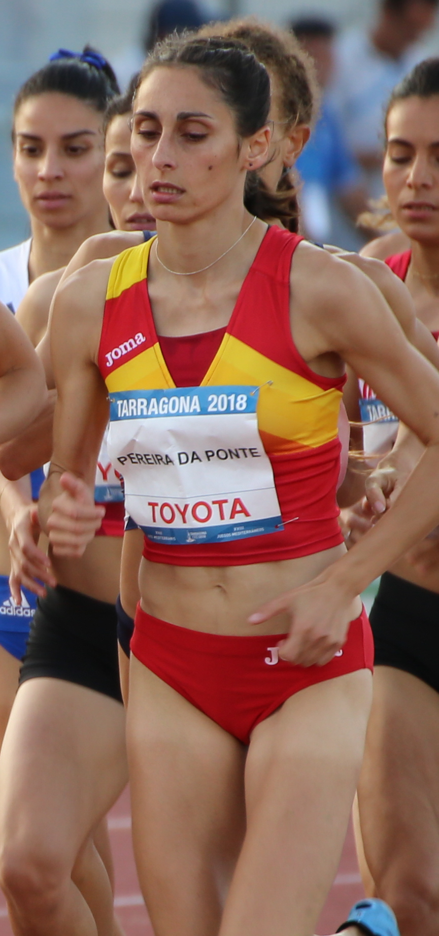 1500 metros en los Juegos del Mediterráneo 2018